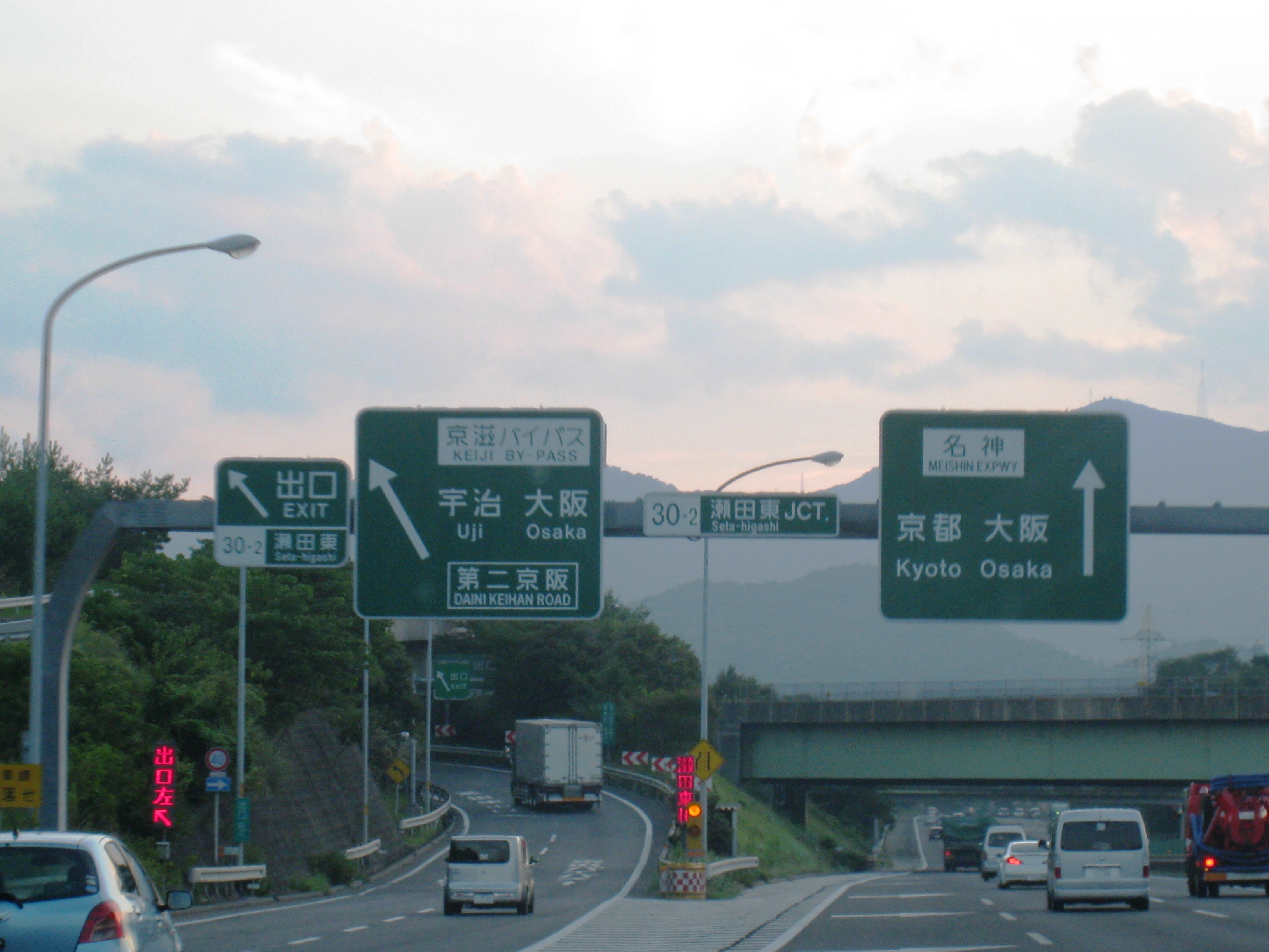 瀬田東ジャンクション案内板（名古屋方面から）